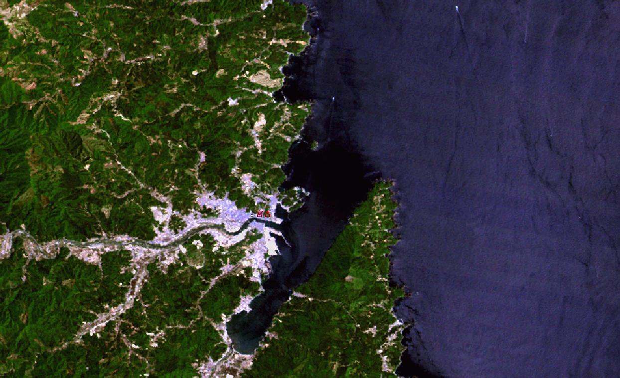 Miyako Gulf, Japan